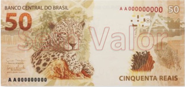 Verso da nova nota de 50 reais.